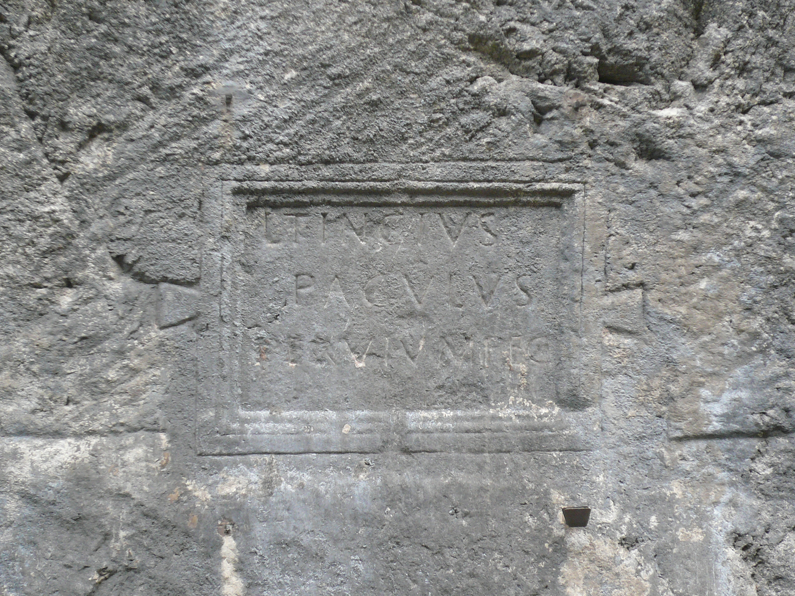 Inscription commémorative d'époque gallo-romaine au niveau du passage de la voie romaine dans la cluse du Fier, dans la commune de Dingy-Saint-Clair, Haute-Savoie, Rhône-Alpes, France ; L(ucius) Tincius / Paculus / pervium fecit. CIL XII 2555 = ILHSavoie 00055 = ILN-05-03, 00779 = CAG-74, p 223